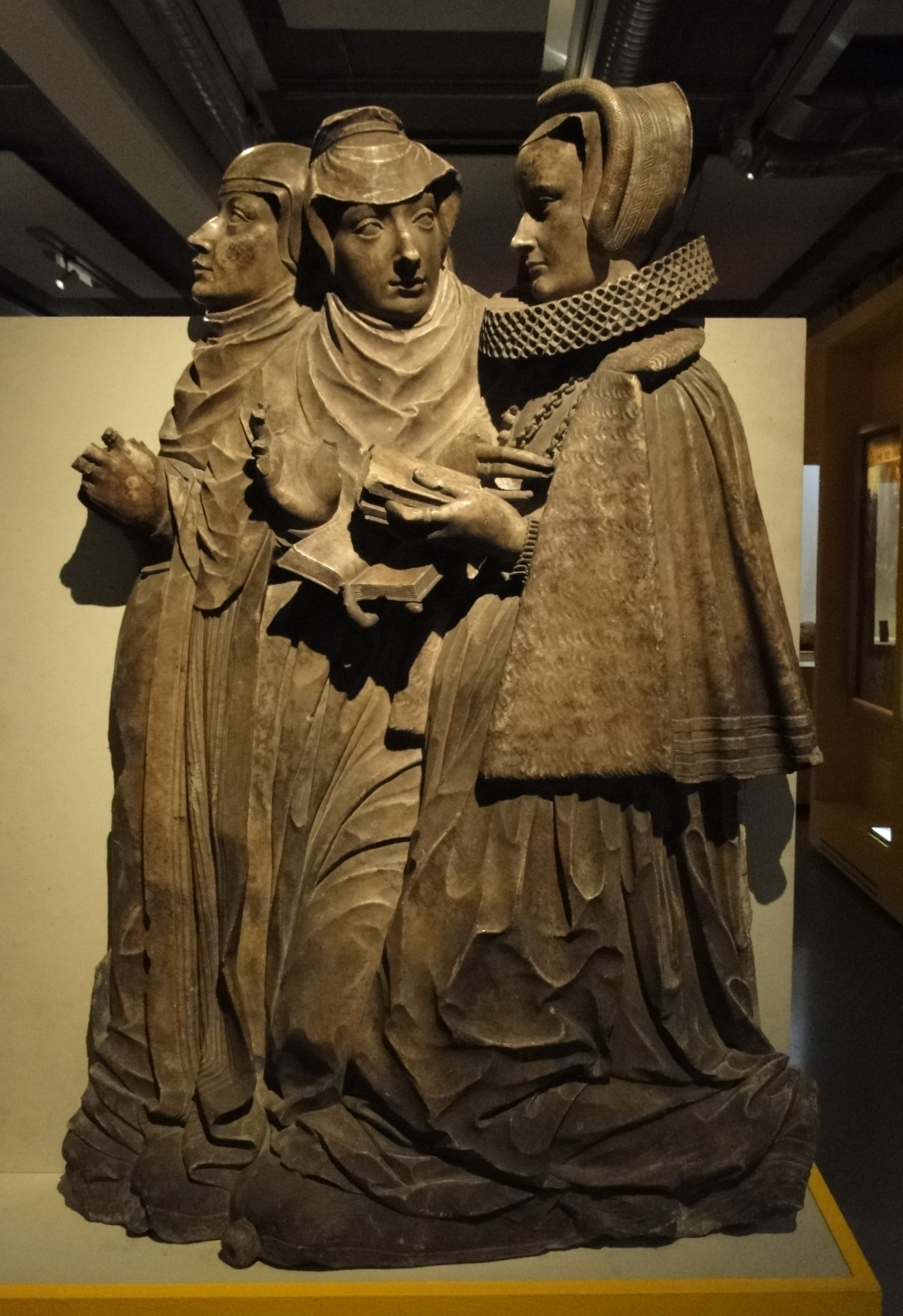 Teil des Nosseni-Epitaphs im Stadtmuseum Dresden